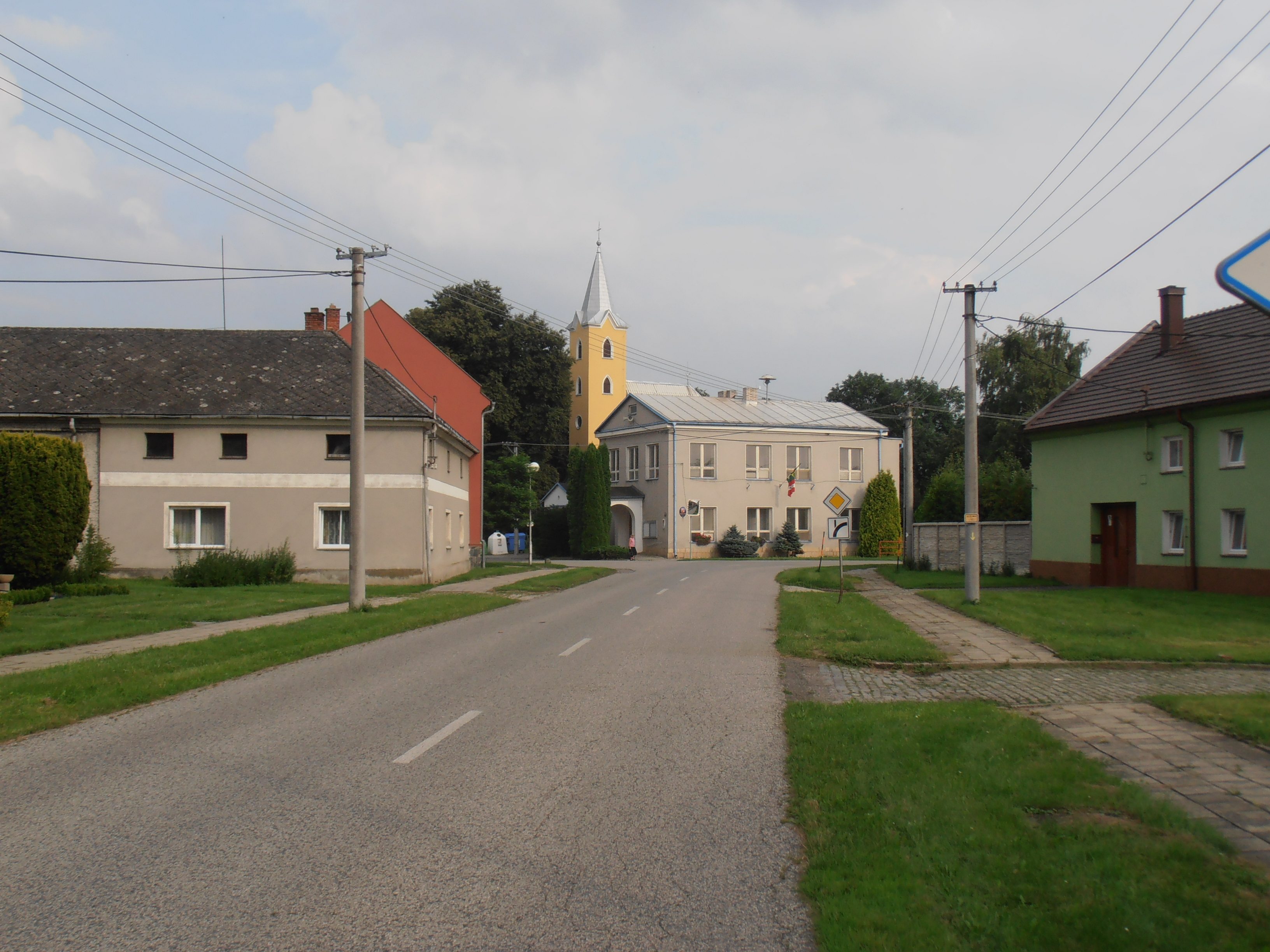 Hlušovice,uprostřed budova obecního úřadu,zy ním kostel